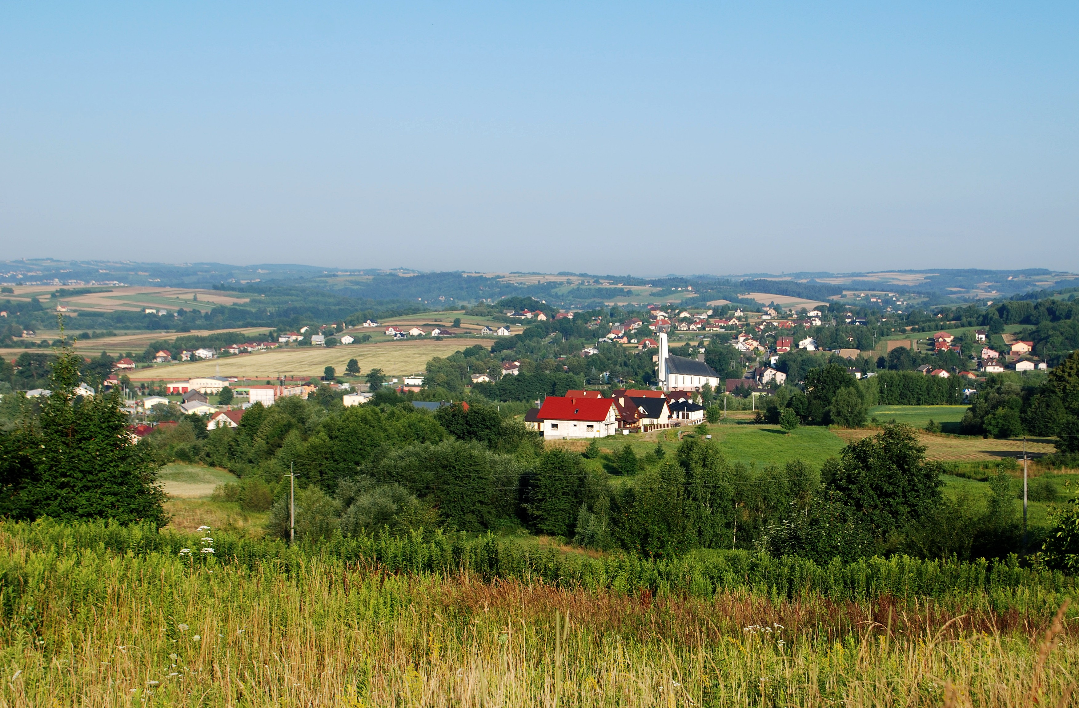 wieś Skołyszyn